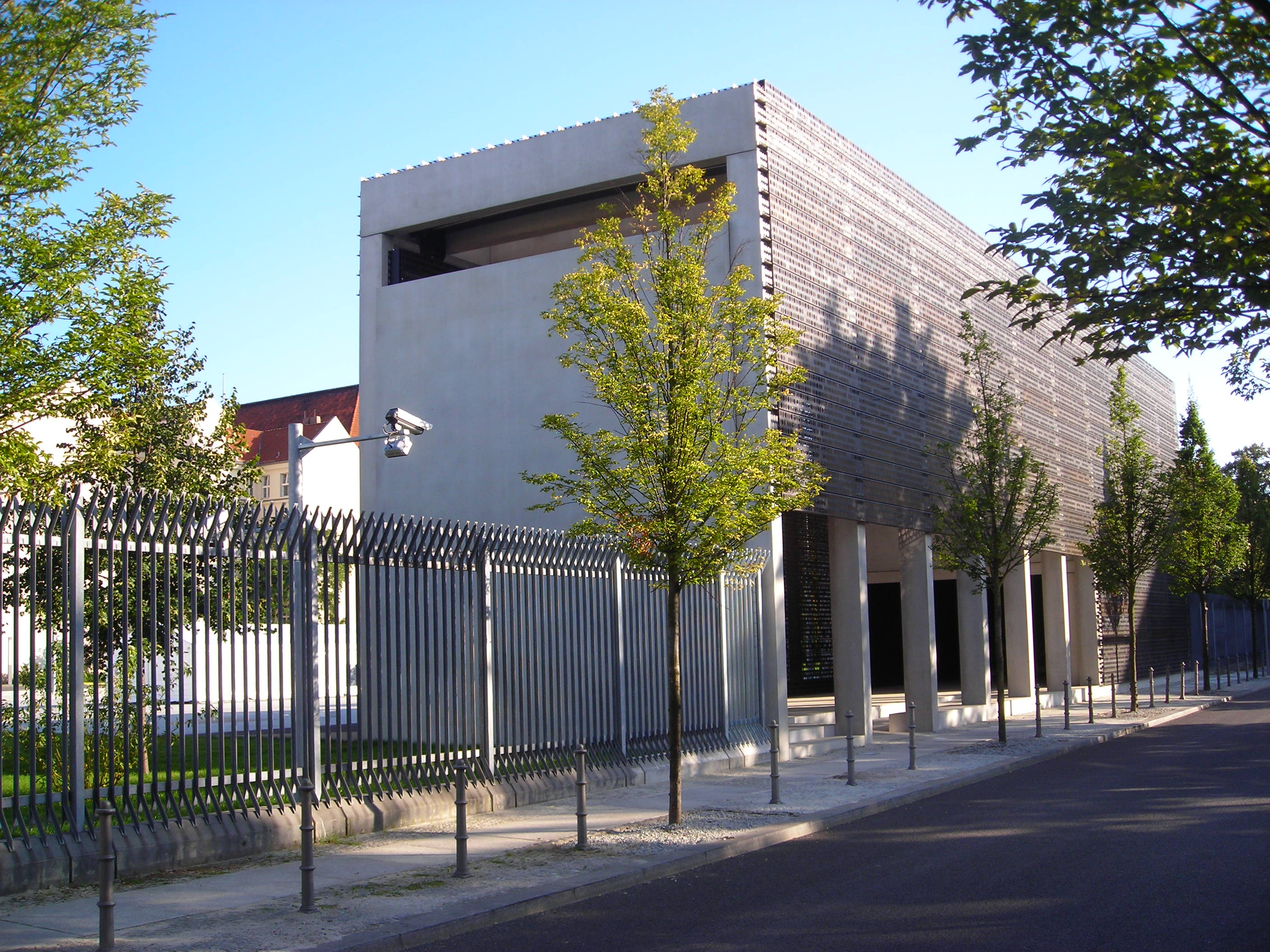 Das Ehrenmal der Bundeswehr am Bendlerblock, dem Berliner Dienstsitz des Bundesministeriums der Verteidigung